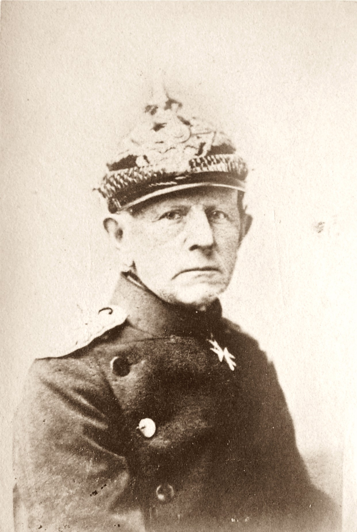 General Helmuth Karl Bernhard von Moltke